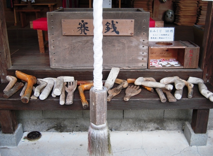 熊本県上益城郡嘉島町の甲斐神社（足手荒神）社殿